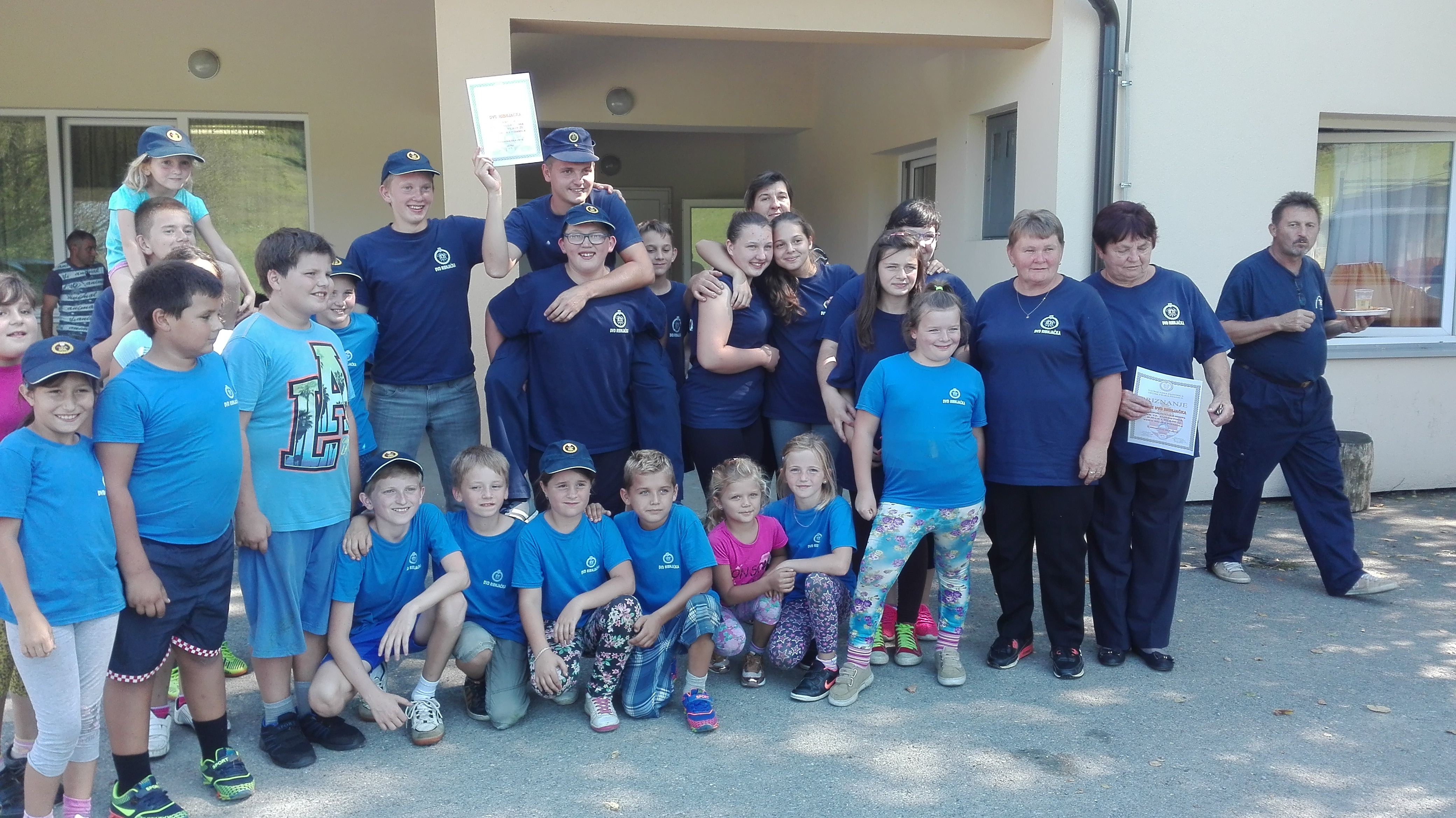 Pobjednička ekipa DVD-a Ribnjačka 2016.